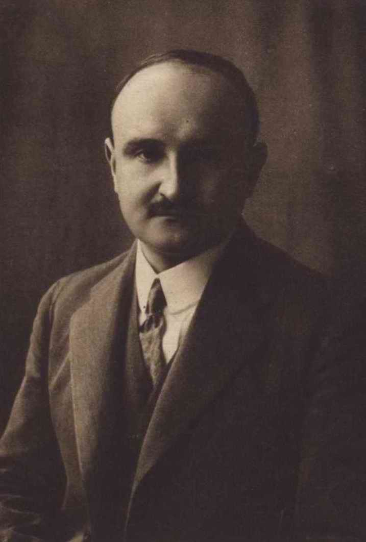 Karel Neubert, syn vydavatele Václava Neuberta